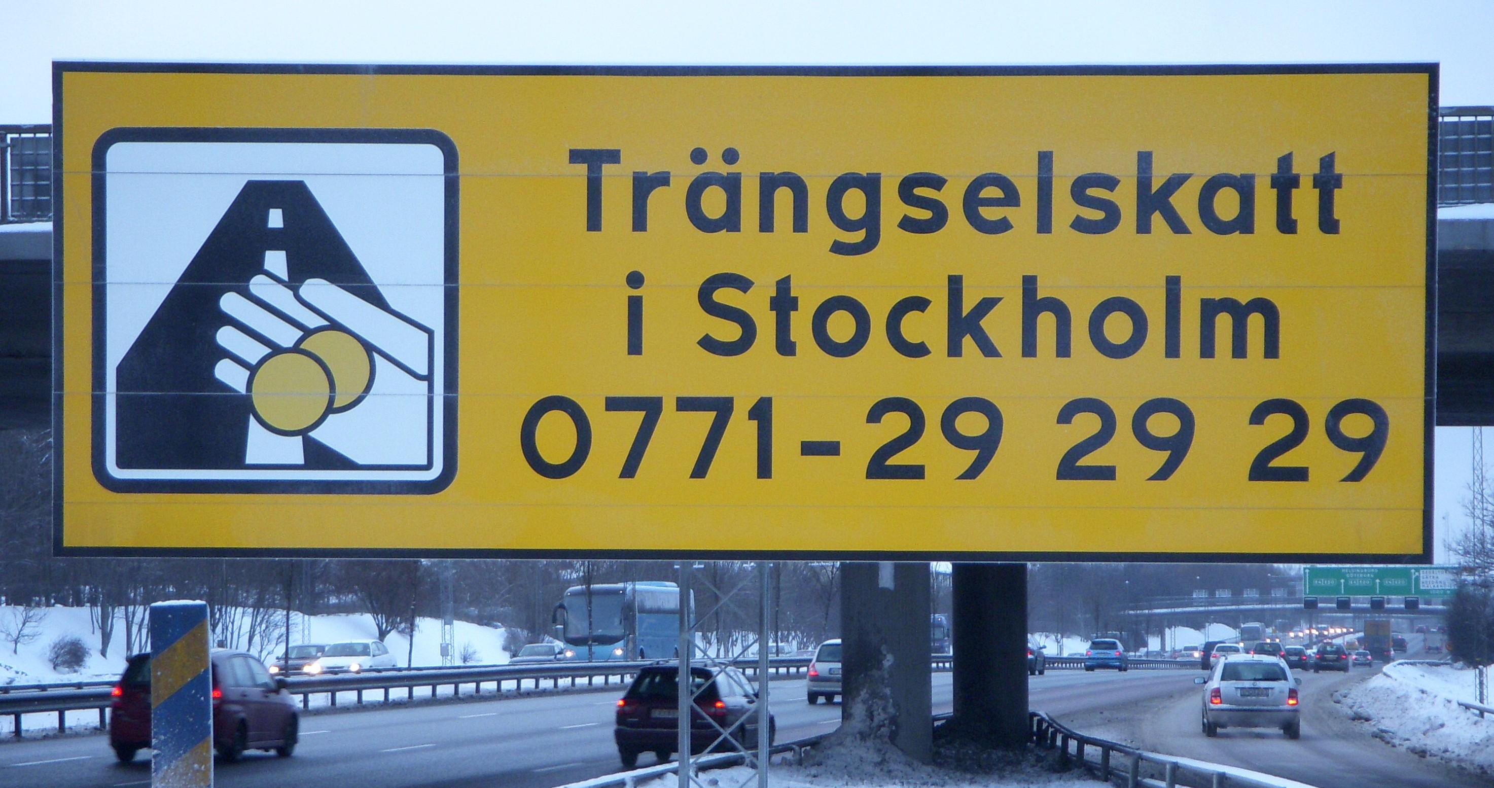 Trängselskatt skylt vid Södertäljevägen